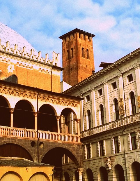 La torre degli Anziani da Piazza delle Erbe a Padova.